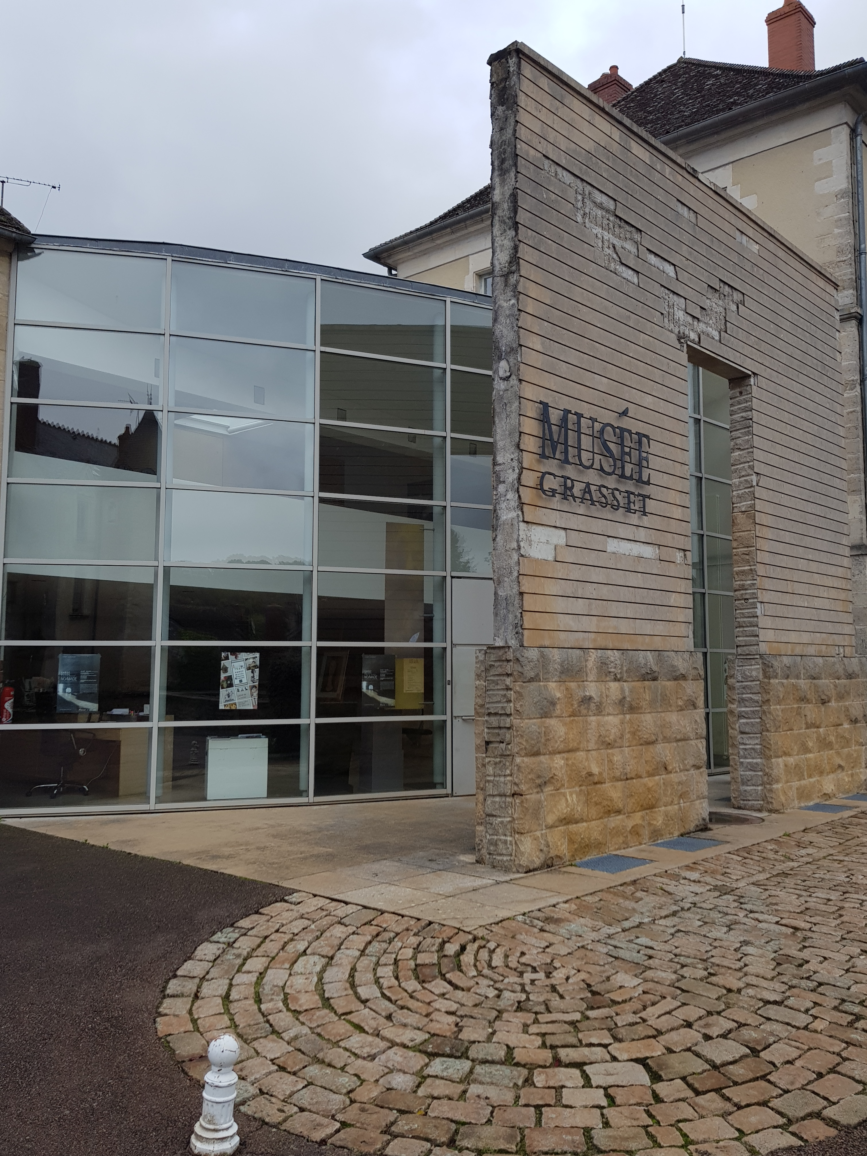 Musée Auguste-Grasset, Varzy (Nièvre).